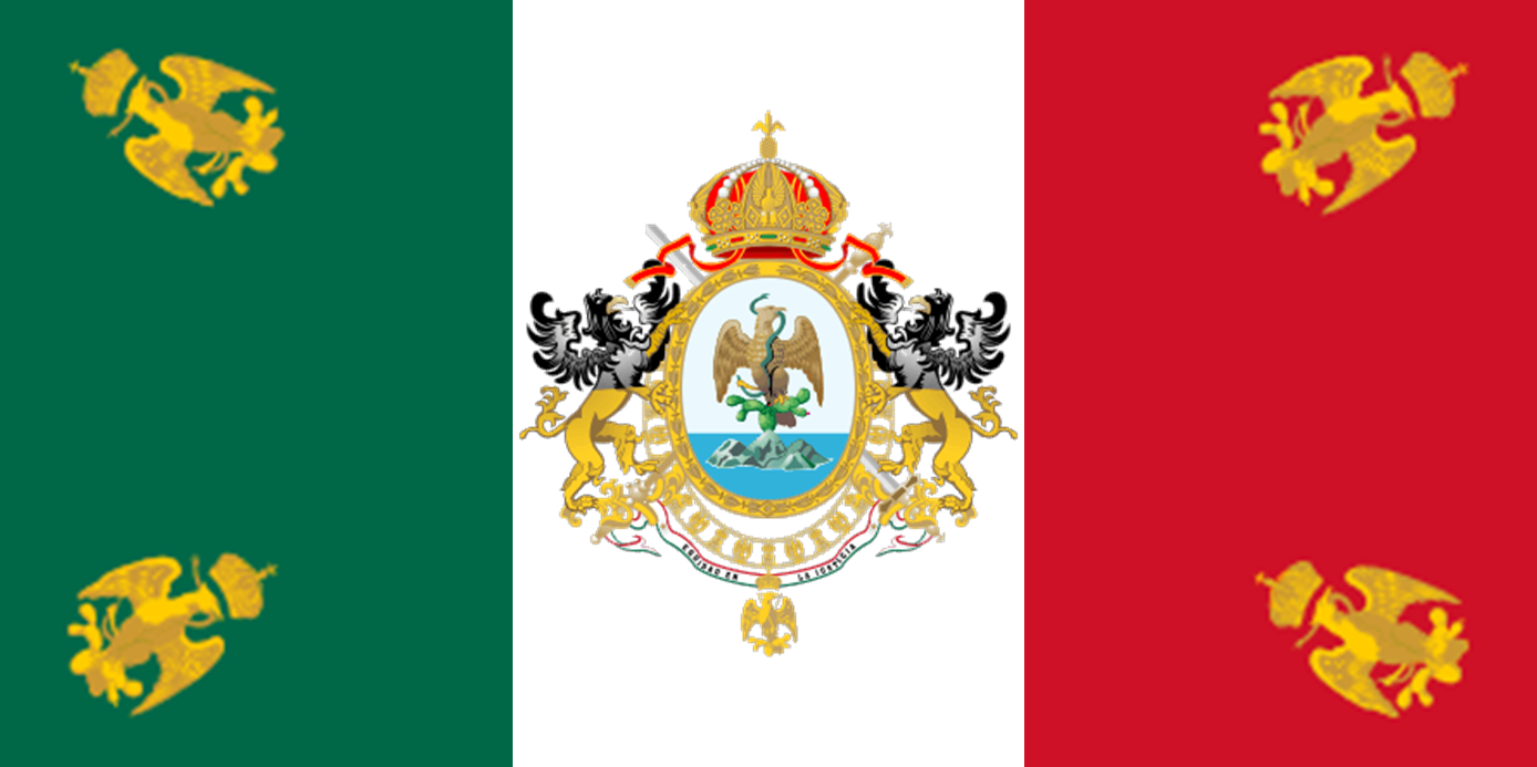 Bandera que se usó en México durante la intervención francesa. No es trabajo propio, la imagen es de Juan Manuel Gabino Villascán... de FOTW. Saludos.